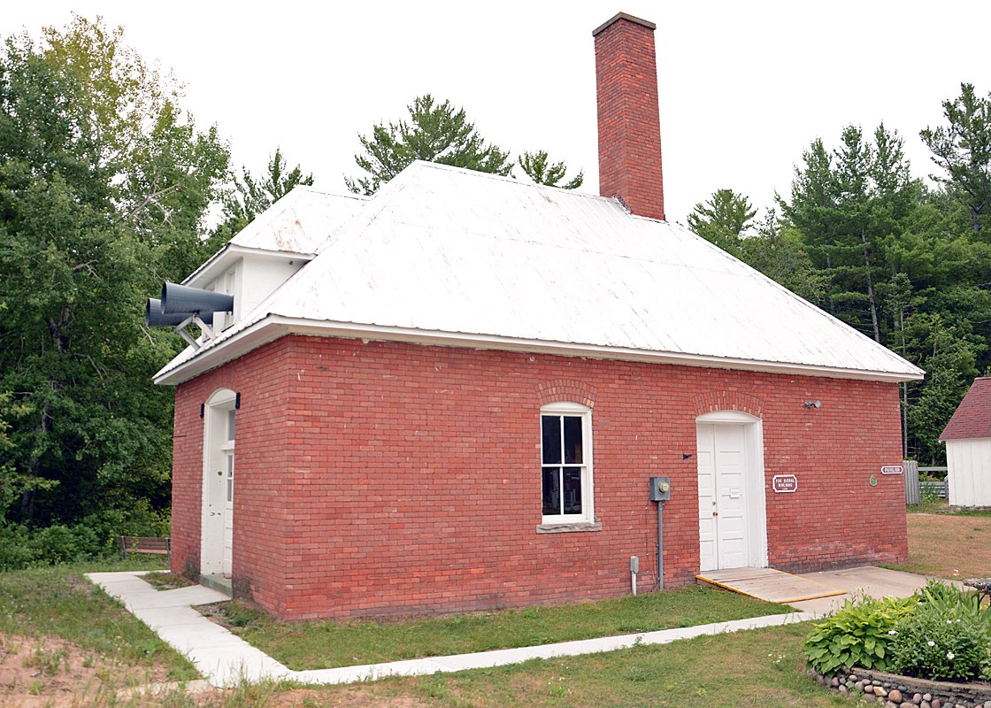 Forty Mile Lighthouse, Michigan (Foghorn building)